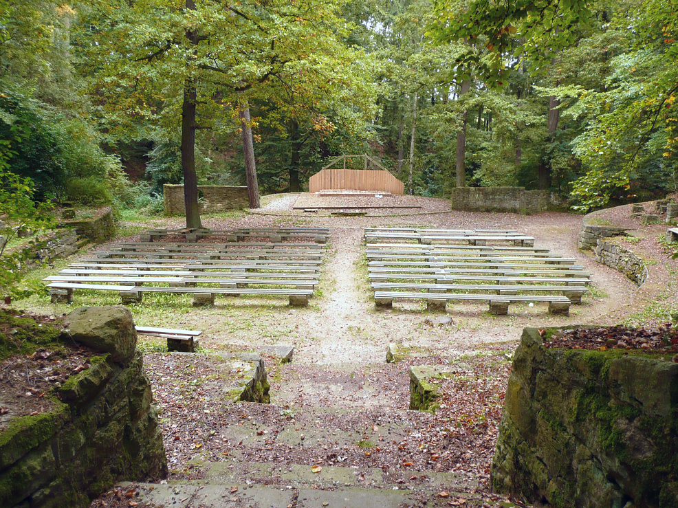 Freilichttheater Kattenbühl Hann. Münden